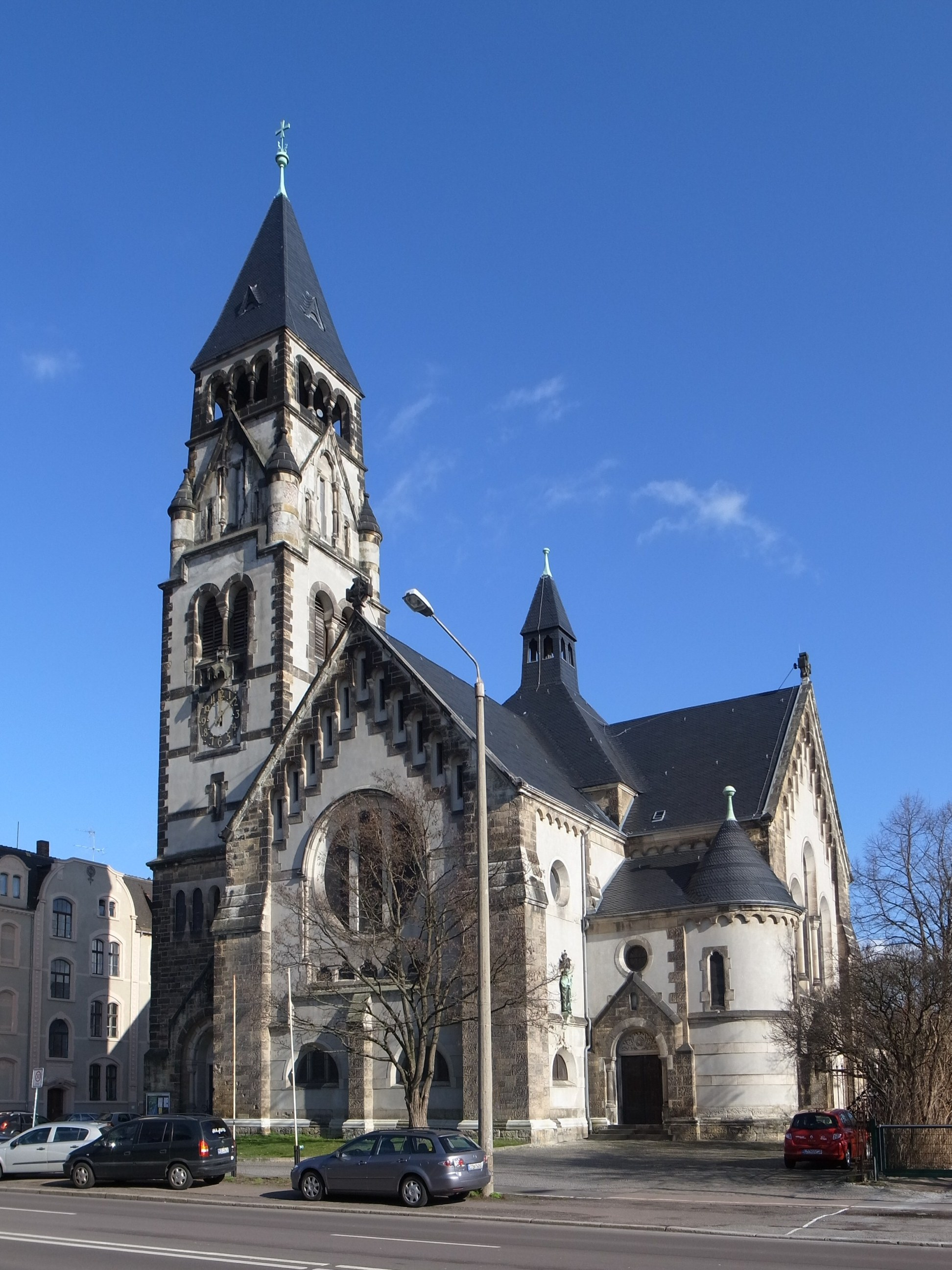 Dessau,Petruskirche